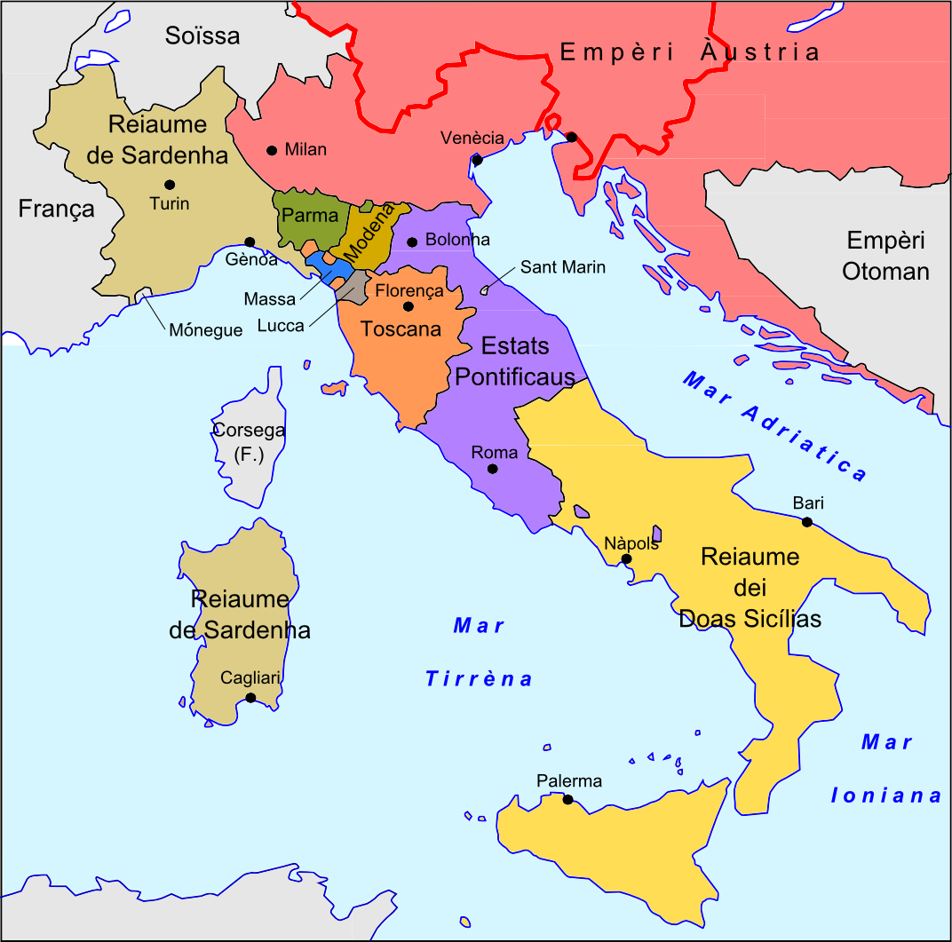 Itàlia en 1815 après lo Congrès de Viena.